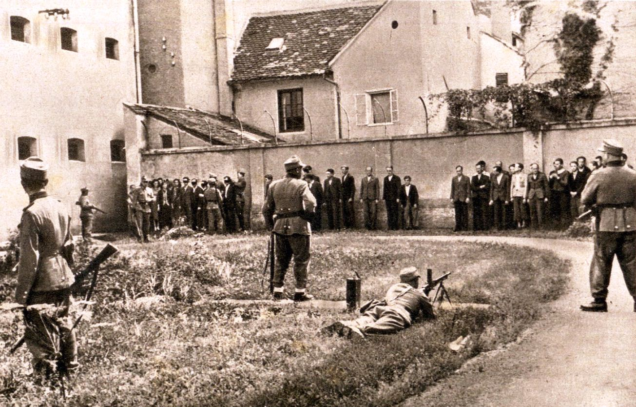 Talcem zavezujejo oči pred streljanjem, Stari Pisker, 22. julija 1942.